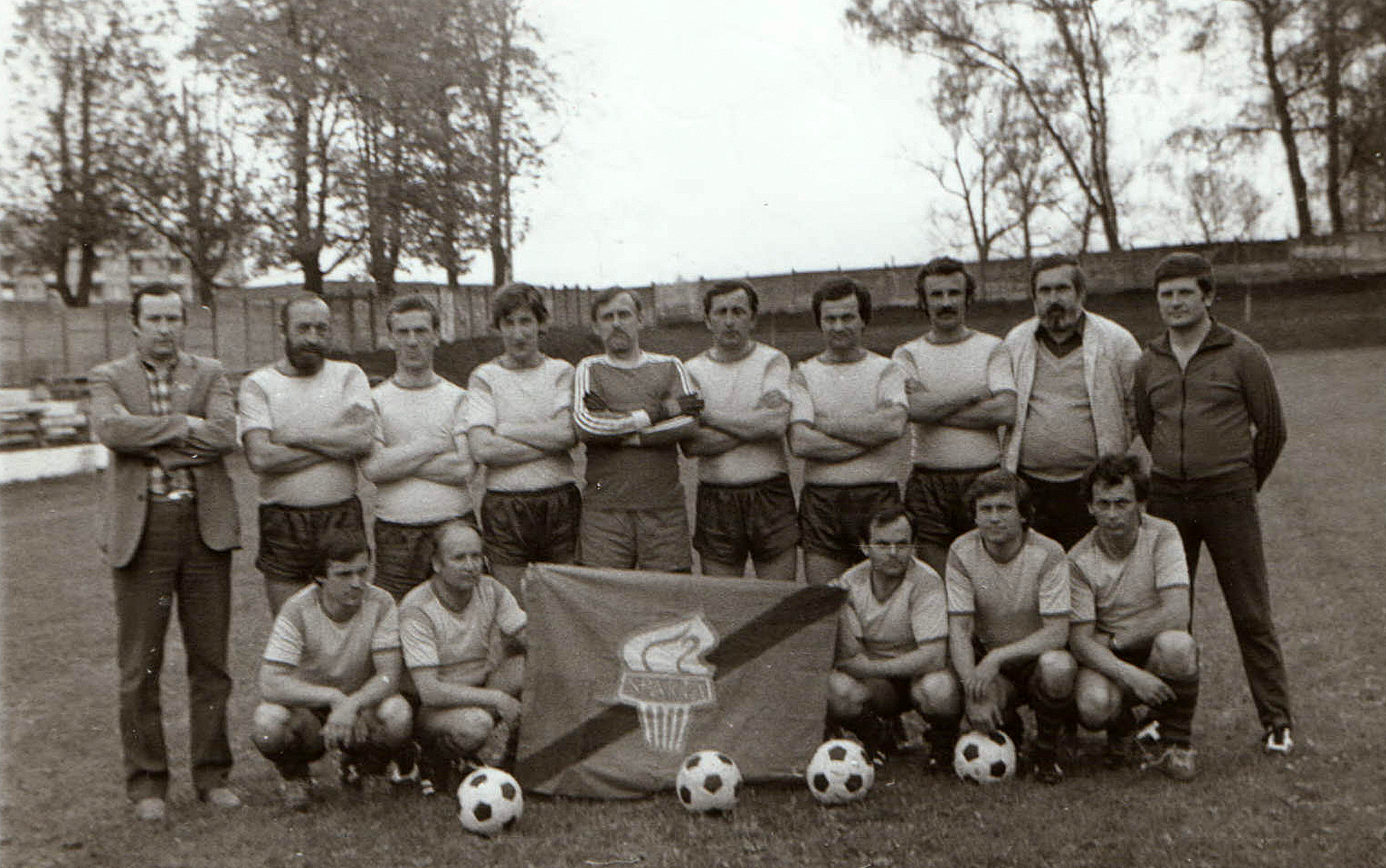 Olboye Sparty Gryfice - półfinaliści XVIII Zimowego Turnieju o puchar Kuriera Szczecińskiego od góry z lewej stoją: 1. Jan Sadowski, 2. Janusz Szymański, 3. Henryk Modliński, 4. Włodzimierz Parol, 5. Jan Małkowski, 6. Tadeusz Filipiak, 7. Józef Wigurski, 8. Andrzej Kurkiewicz, 9. Eugeniusz Binięda, 10. Wiesław Żankowski, od dołu z lewej: 1. Ryszard Likuń, 2. Jan Sowiński, 3. Jan Graduszewski, 4. Edward Sulwiński, 5. Sławomir Borowski